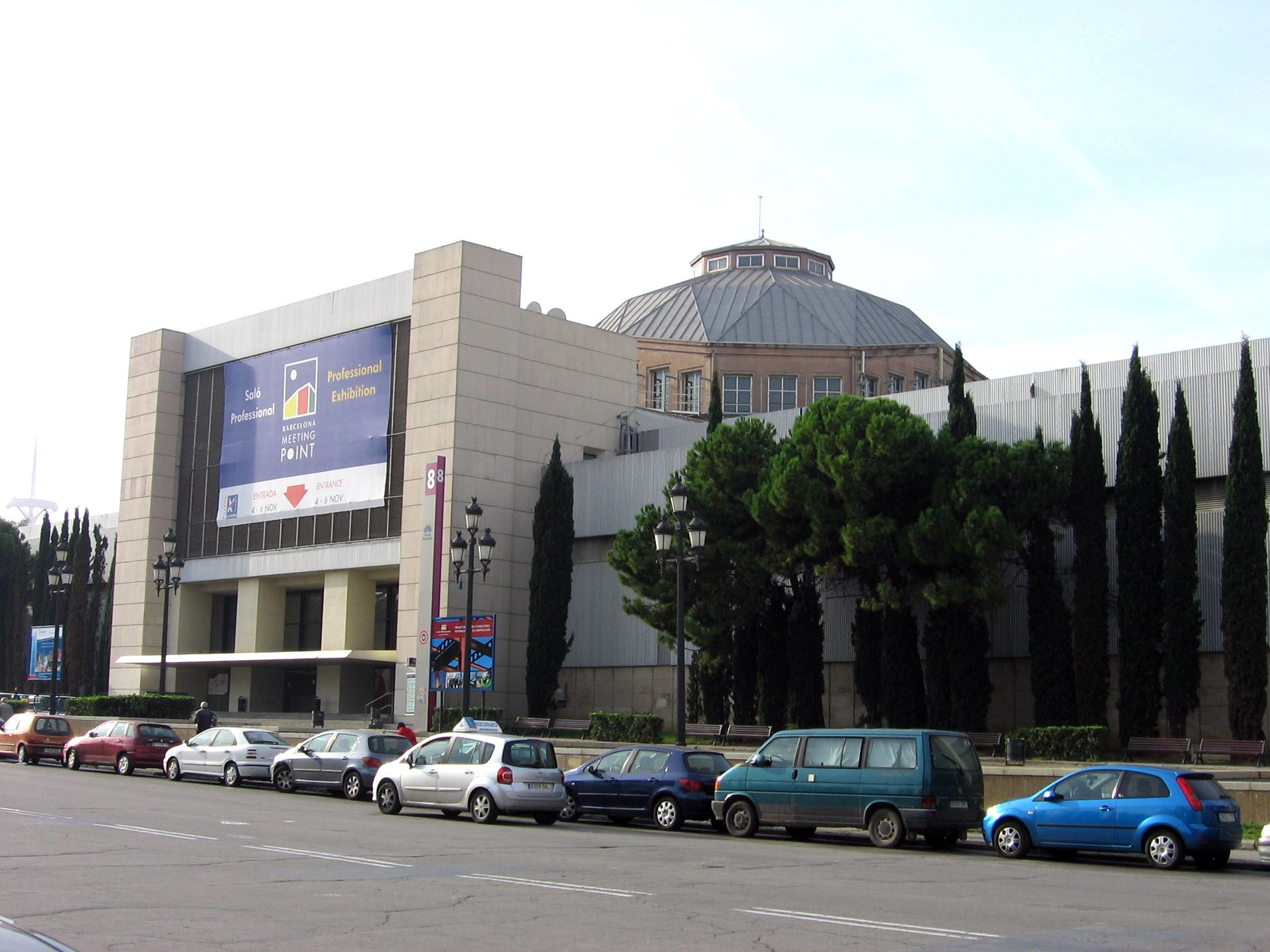 Palacio de la Metalurgia, Montjuïc (Barcelona)